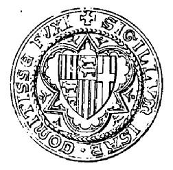 Isabelle de Foix-Castelbon